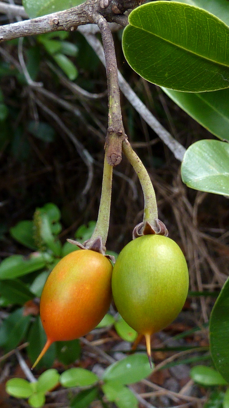 Manilkara dardanoi Ducke